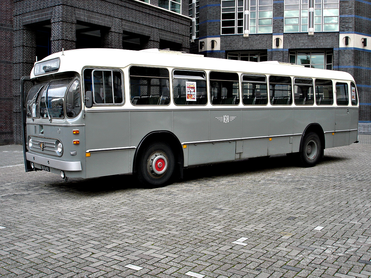 HBM 4842, een Leyland/Werkspoor van de NZH uit 1960. Thans bij Haags Bus Museum